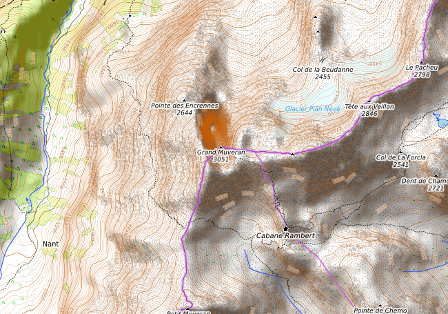 carte réalisée sur umap This map may be incomplete, and may contain errors. Don't rely solely on it for navigation.